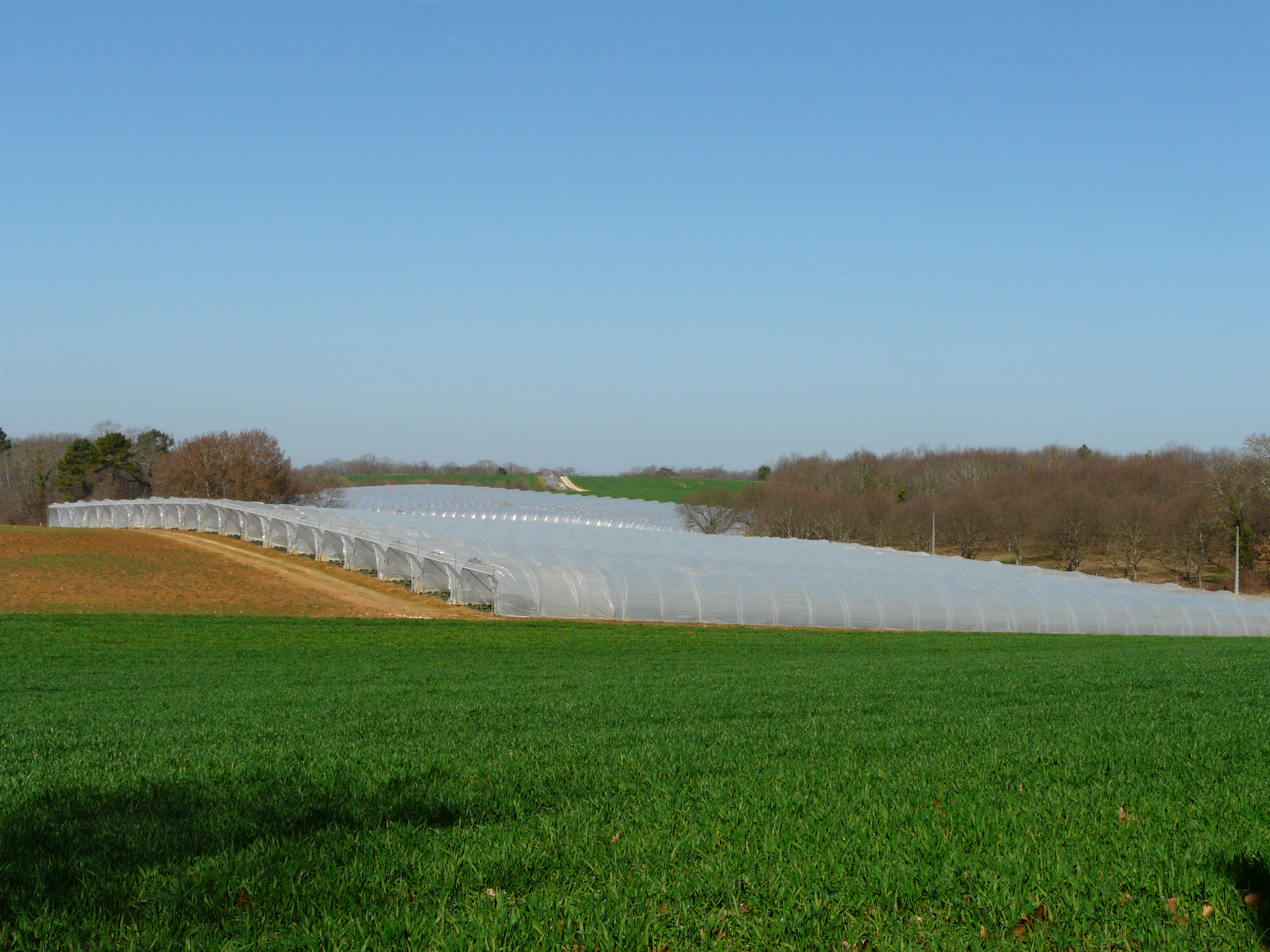 Tunnels de culture de fraises au lieu-dit la Forêt, Fouleix, Dordogne, France.